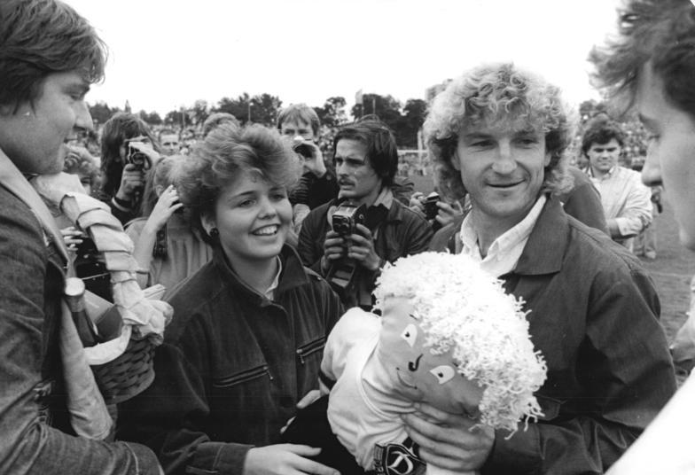 ADN-ZB-Häßler -23.8.86-hä-wo- Dresden: Hans-Jürgen Dörner, langjähriger Kapitän der Dresdner Dynamo-Mannschaft, wurde herzlich als aktiver Fußballer verabschiedet. Blumen und Erinnerungsgeschenke erhielt Hans-Jürgen Dörner (2.v.r.) von seinen Anhängern aus Dresden.